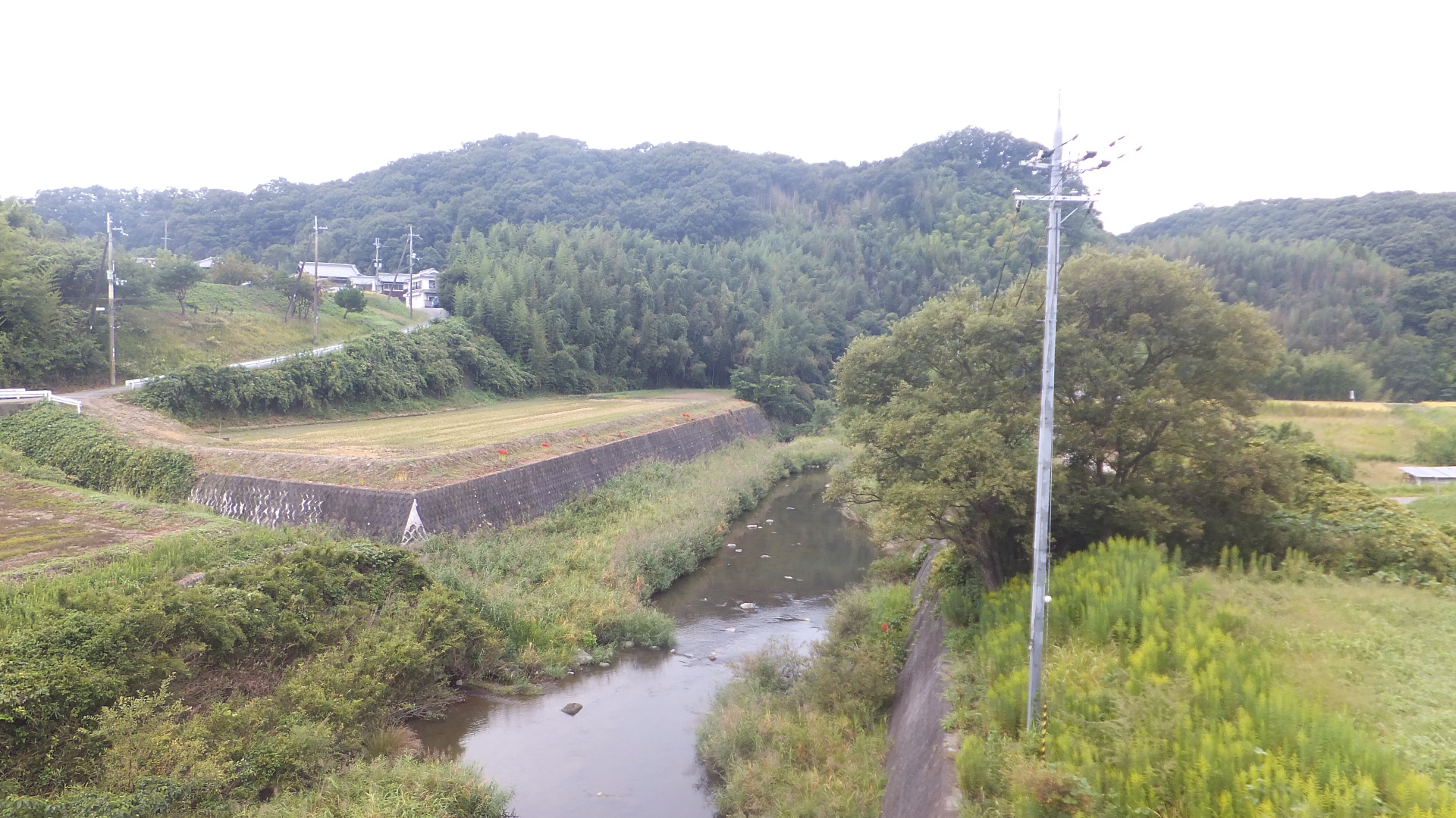 兵庫県三木市志染町三津田 志染川